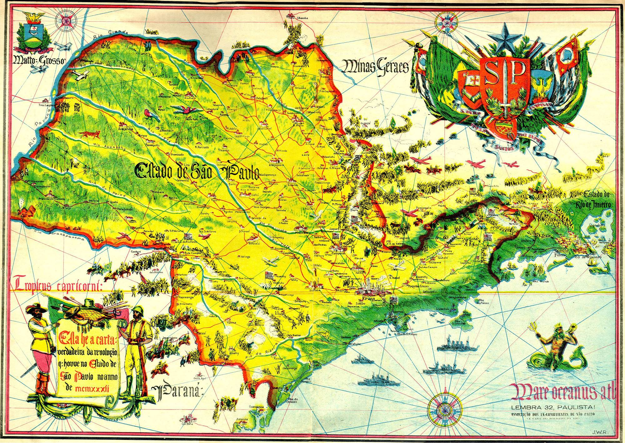 Reprodução do original mapa didático e ilustrativo dos combates em São Paulo da Revolução Constitucionalista de 1932. É de autoria do pintor e ilustrador paulistano José Wasth Rodrigues (1891-1957). A obra integra o acervo do Museu Paulista da USP. Coleção João Baptista de Campos Aguirra - Ref. Agente: A Propagadora, localizada na Rua Libero Badaró, 45, São Paulo - SP